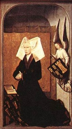 Políptic del Judici Final. Visió tancada. Taules dreta amb la donant, Guigone de Salins, esposa del canceller rOLIN